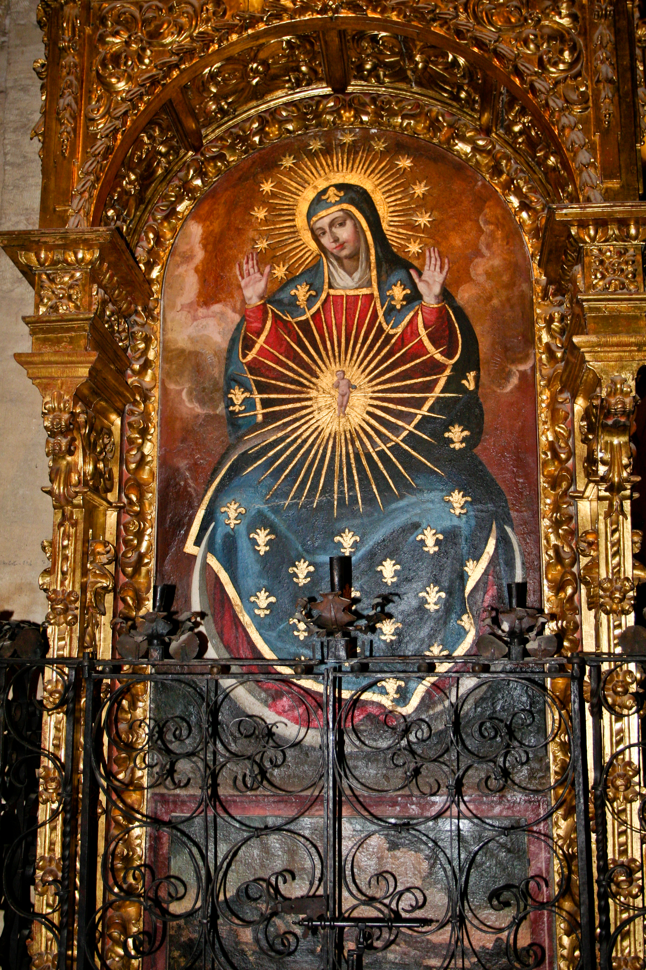 Virgen de la O, Mezquita de Córdoba (España).